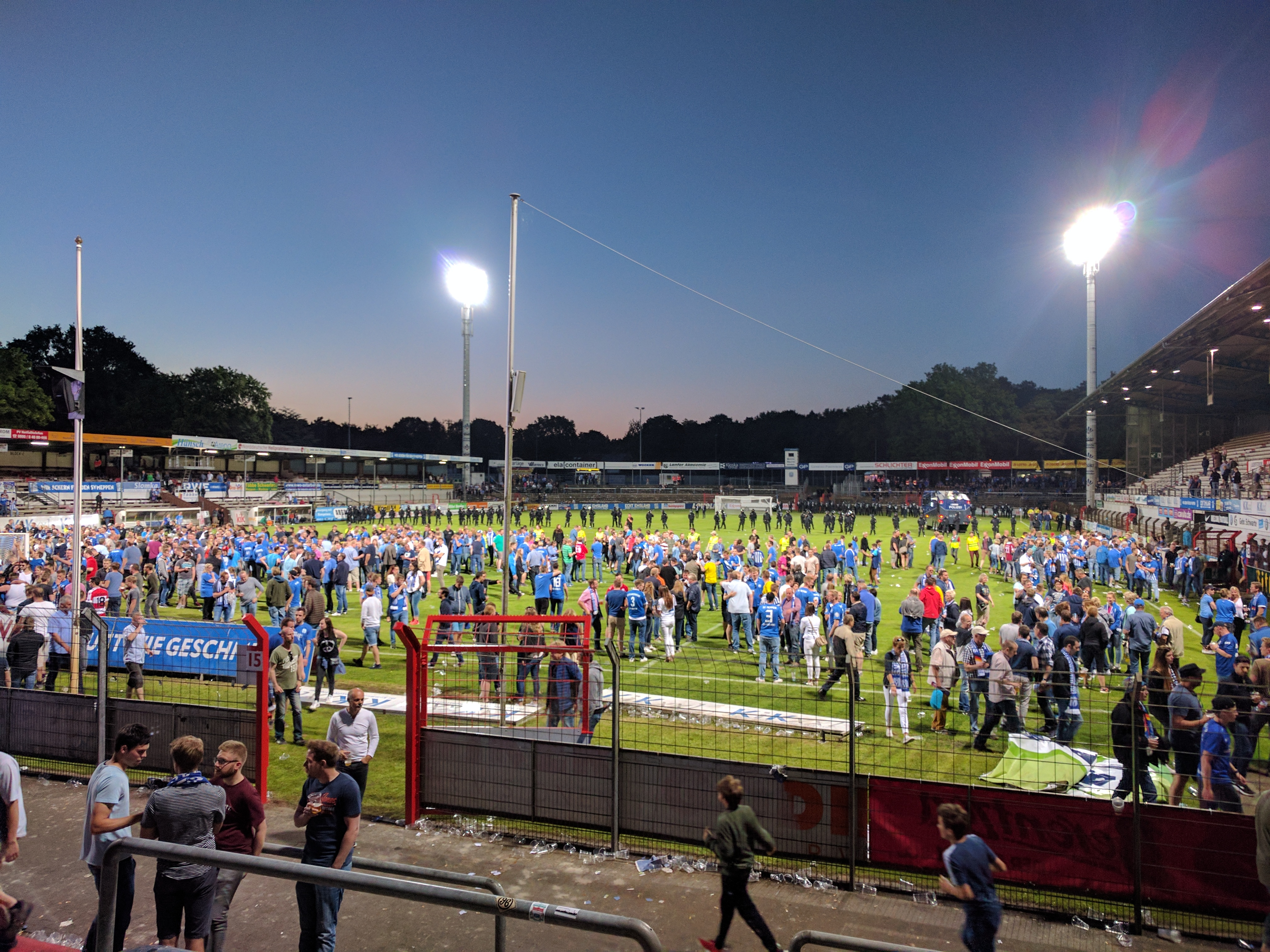 Das Emslandstadion nach dem Aufstiegsspiel des SV Meppen 1912 e.V. gegen den SV Waldhof Mannheim 1907 e.V.